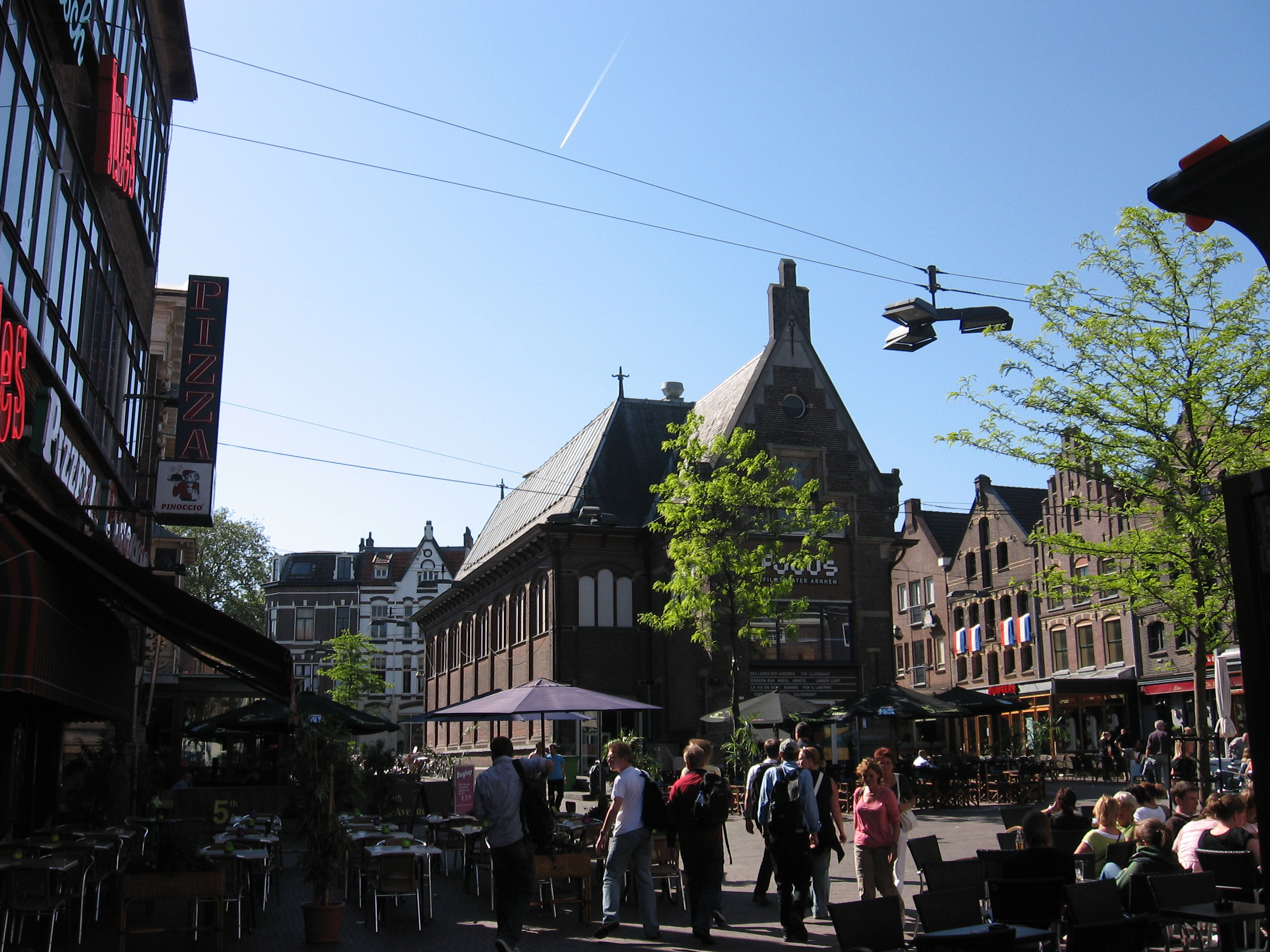 Korenmarkt en -beurs Arnhem